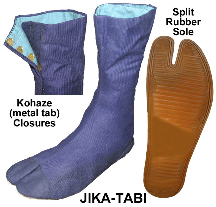 Jika-tabi footwear